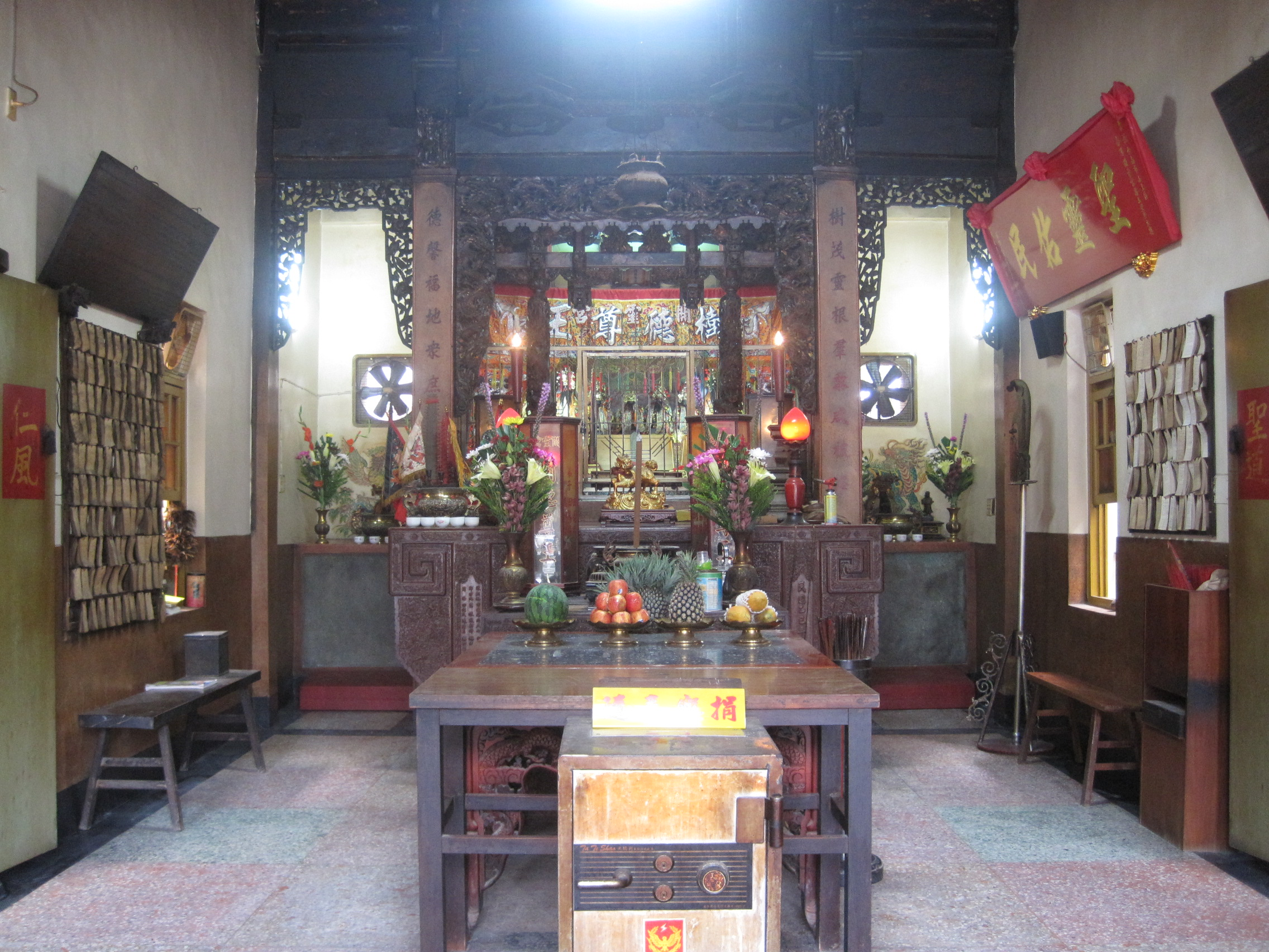 南洲開靈宮正殿